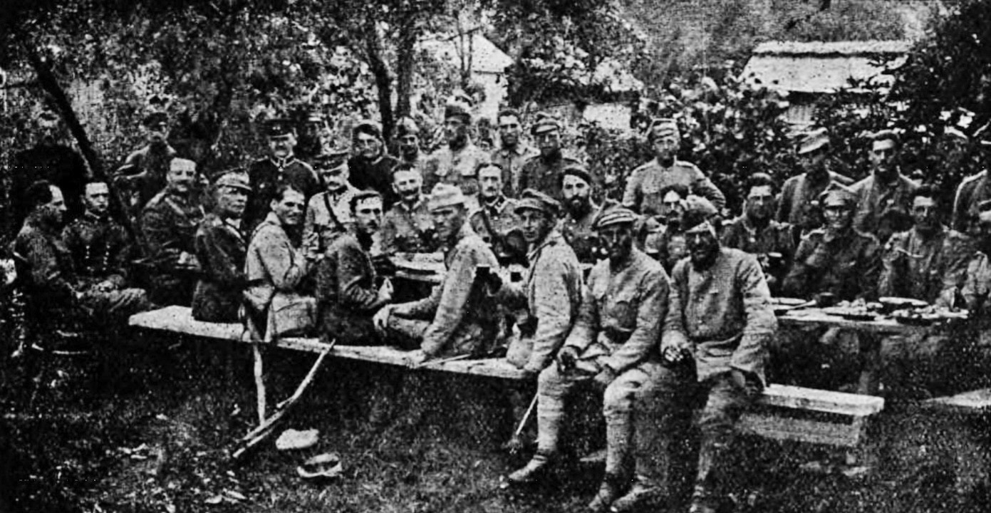 Bankiet spartański 18 Dywizji Piechoty z okazji udekorowania oficerów i szeregowych Orderem Virtuti Militari w Zabołotcach; dowódca 18 DP gen. Franciszek Krajowski widoczny na ławce z lewej. Cytat: "Za bitwy stoczone pod Ostrogiem, Dubnem, Chorupaniem i Brodami, za powiązanie skrzydeł południowego frontu i załatanie wyłomu między 6 i 2 Armią, za heroizm żołnierzy i dowództwa, Dywizja gen. Krajowskiego pierwsza spośród wszystkich otrzymała krzyże Virtuti Militari. Dotąd nikt w wojsku, prócz udekorowanej Kapituły, nie został tym zaszczytnym krzyżem odznaczony."